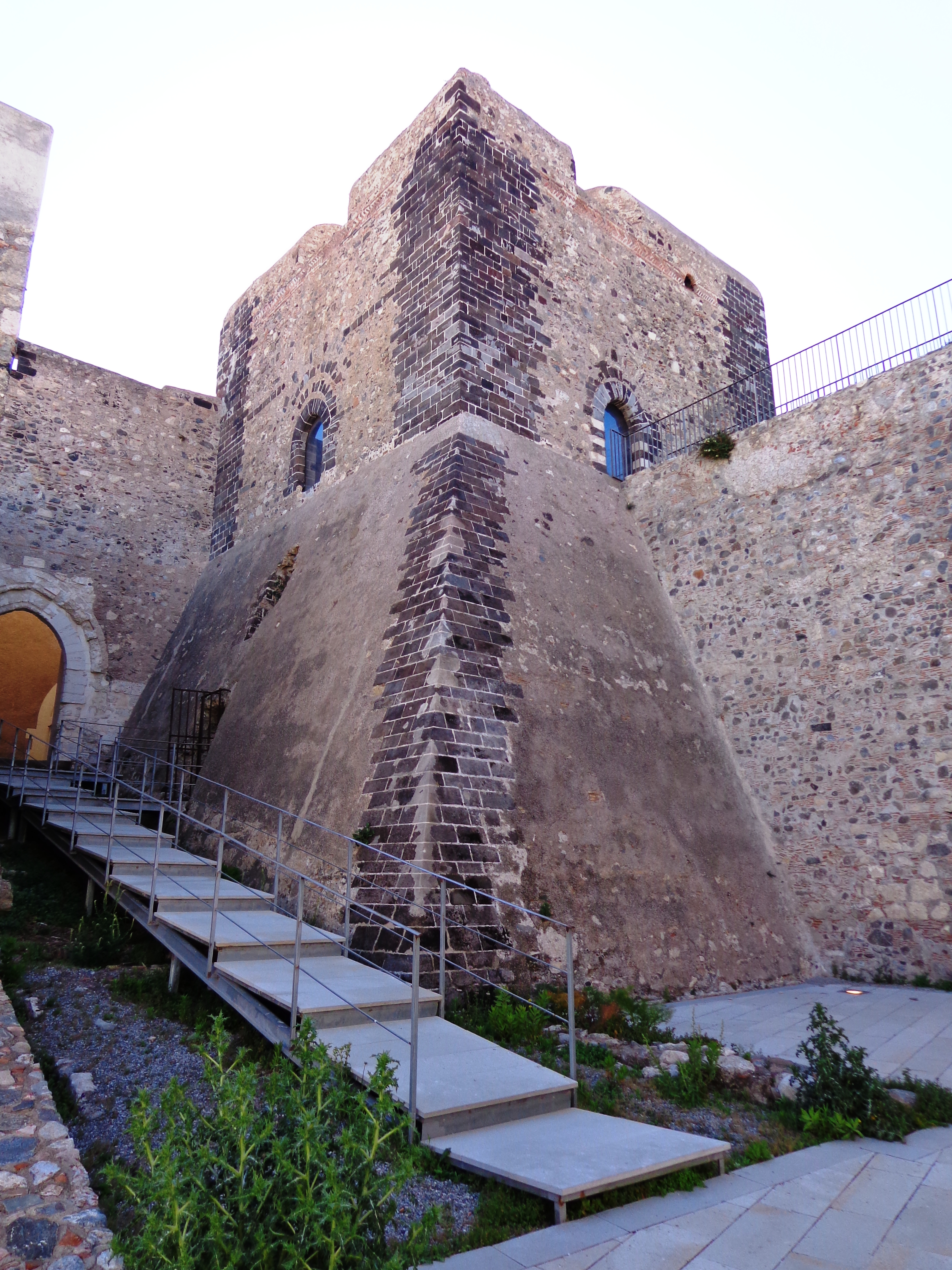 Torrione Saraceno